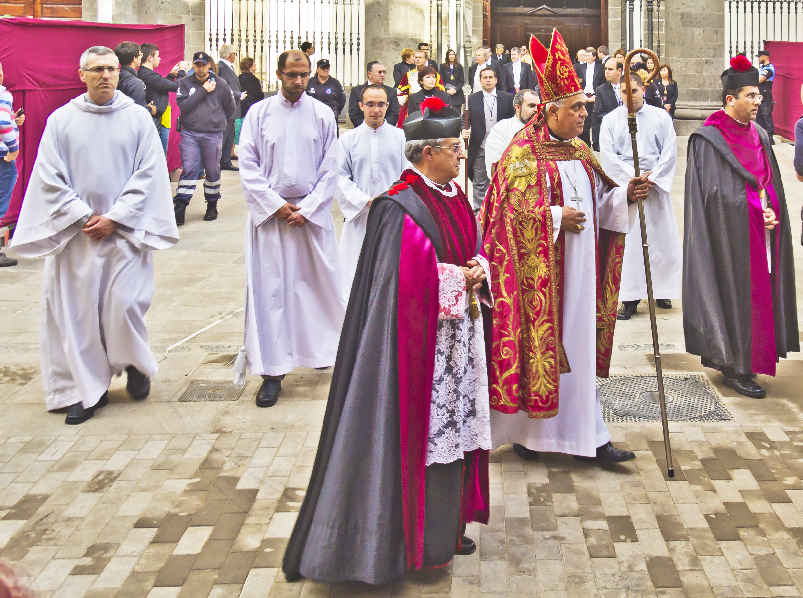 Procesión Magna. Presidida por el Excelentísimo y Reverendísimo Señor Obispo de la Diócesis Don Bernardo Álvarez Afonso